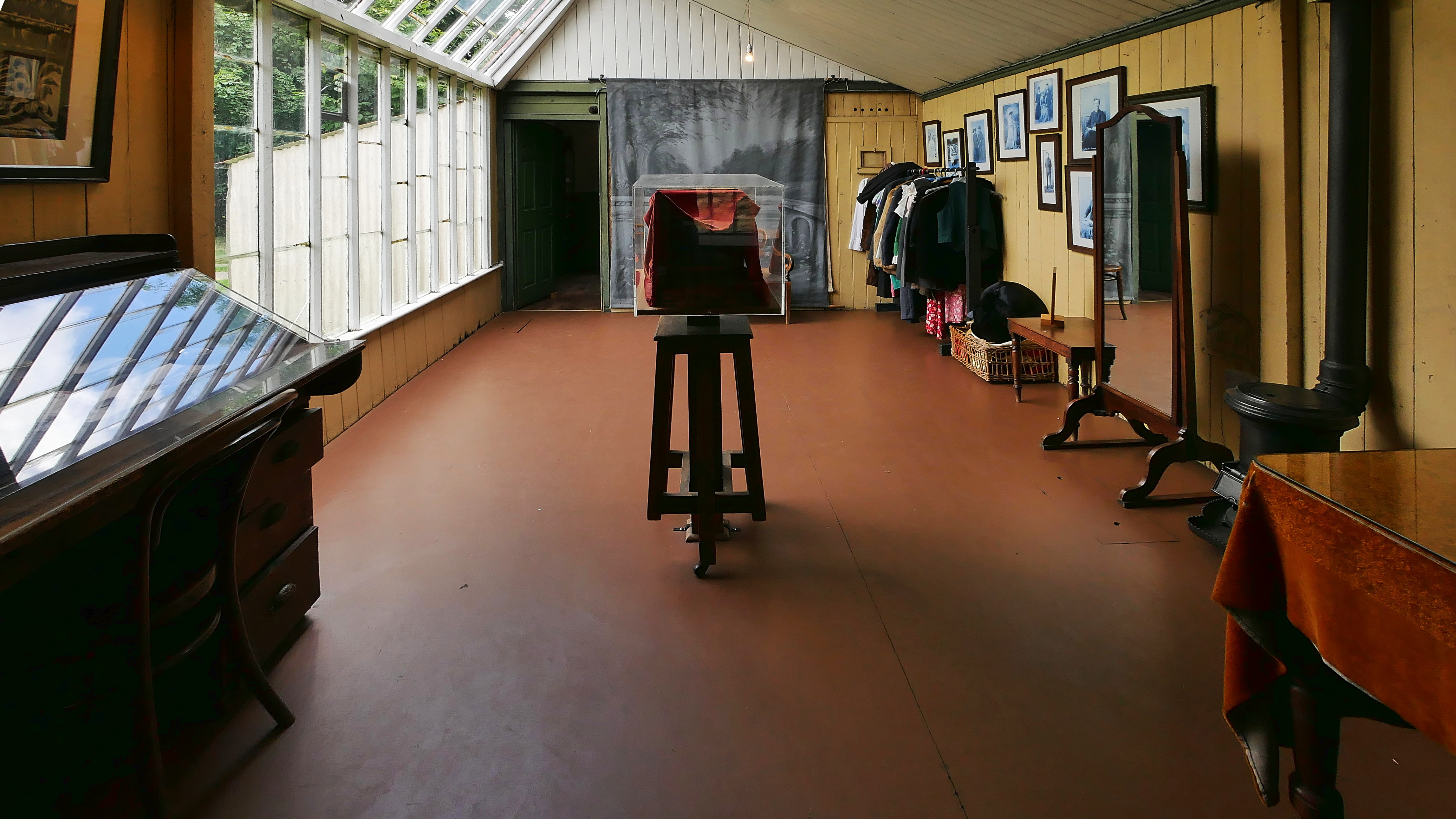 Ryedale Folk Museum - photographic studio